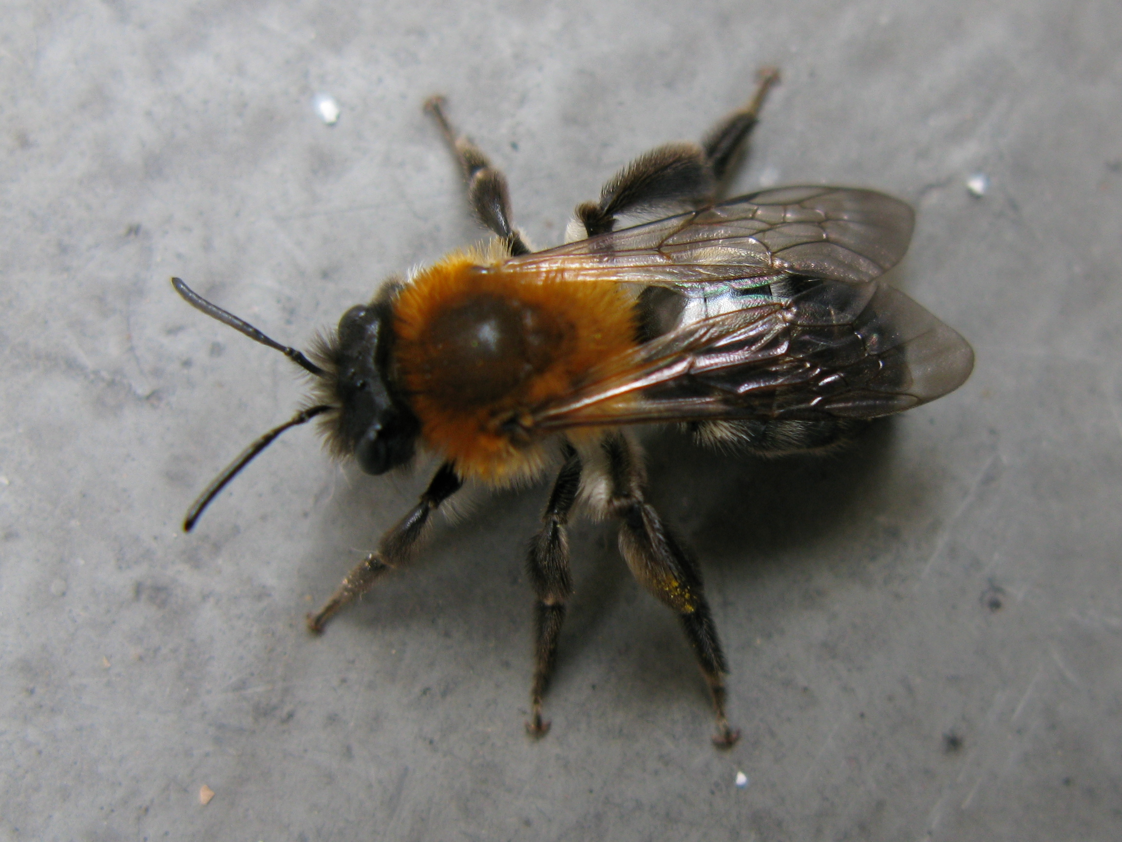 Andrena nitida Hamburg, Germany